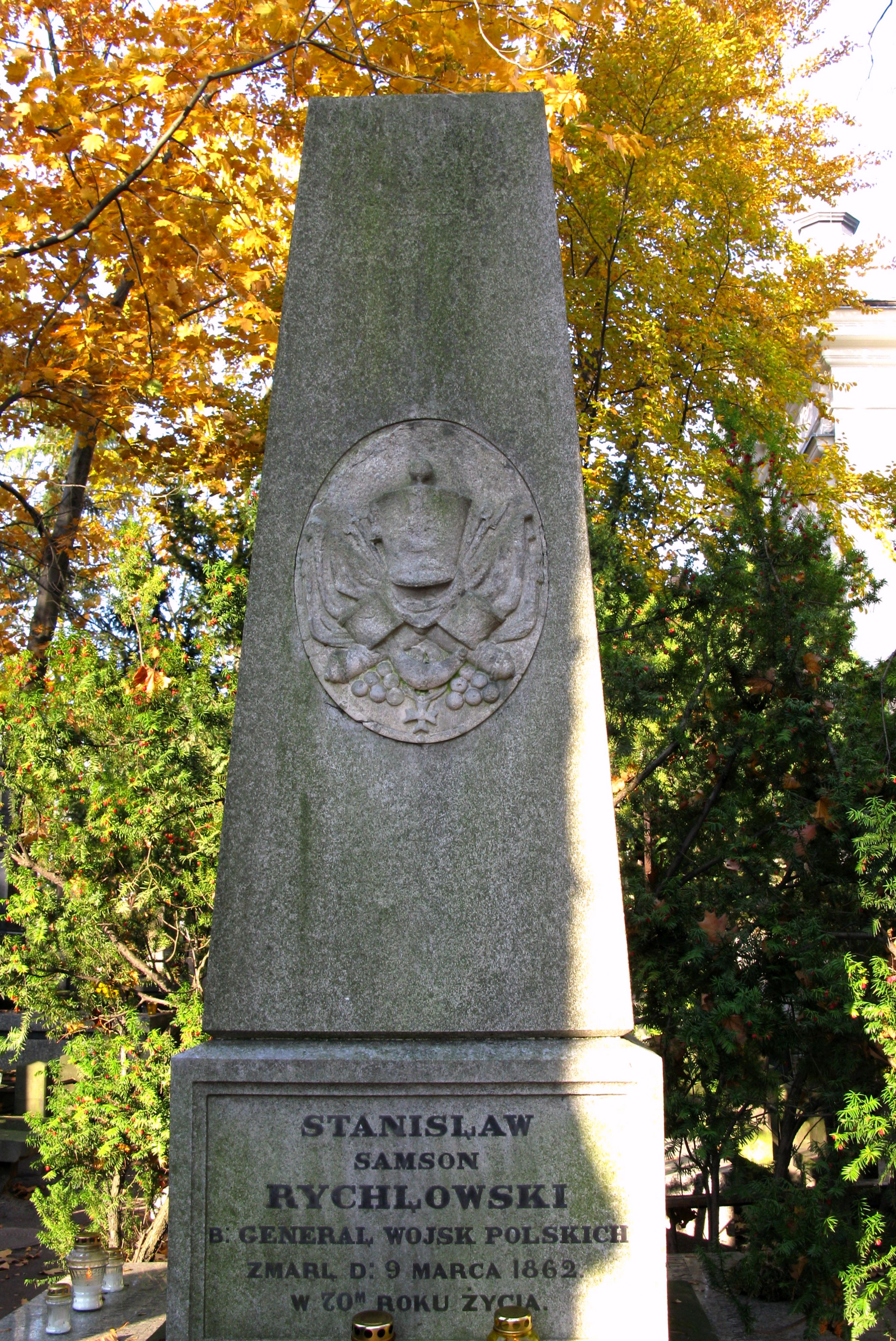 Tomb of General Stanisław Samson Rychłowski in Powązki Cementery in Warsaw